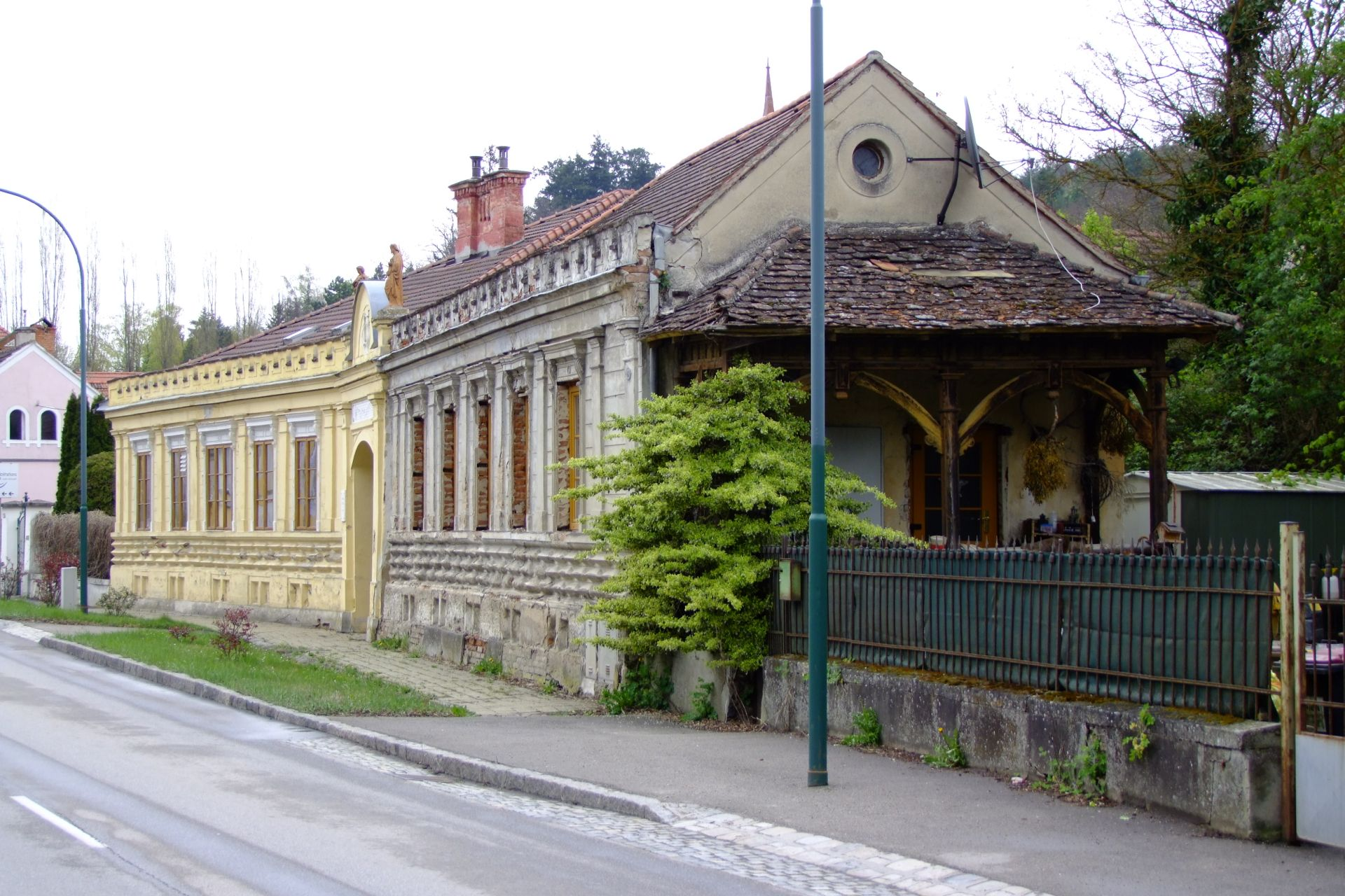 Villa Sophienheim (Wohnhaus mit Veranda und Einfriedung)